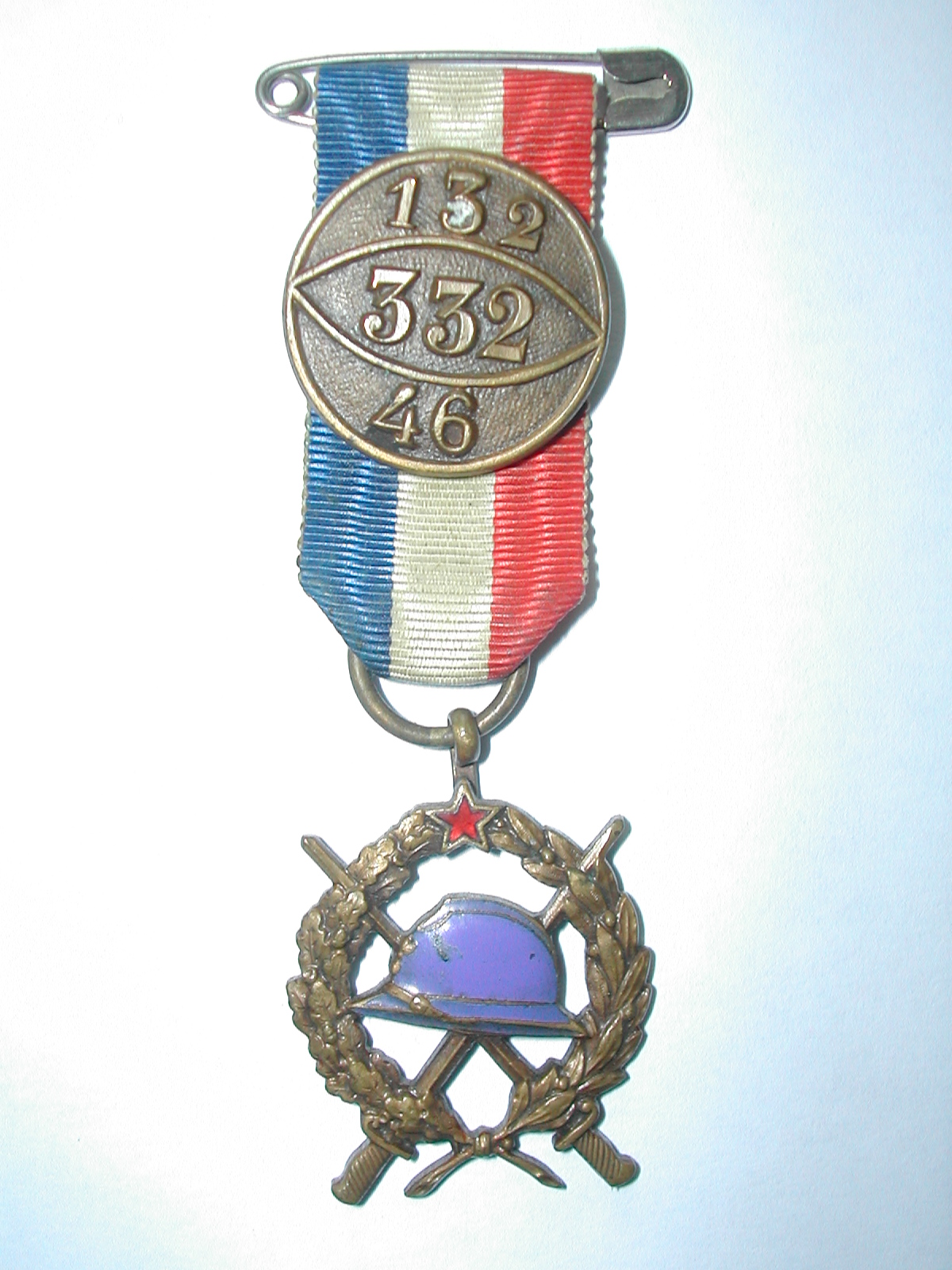 Médaille du 132e - 332e Régiments d'infanterie et du 46e Régiment territorial, collection de la famille Collet.